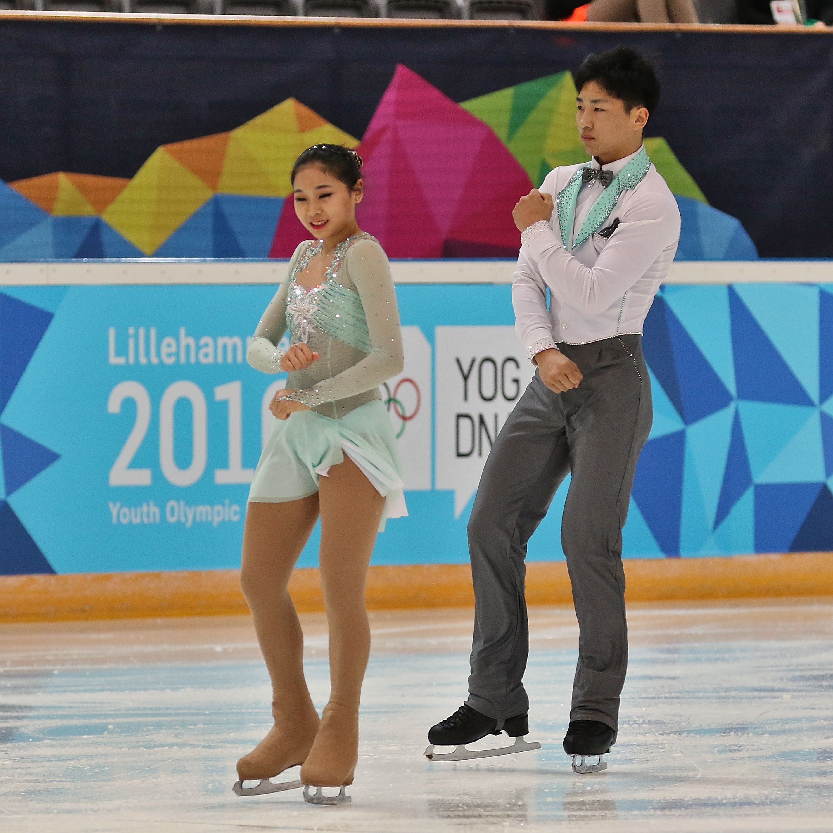 Lillehammer 2016 - Figure Skating Pairs Short Program - Su Yeon Kim and Hyungtae Kim